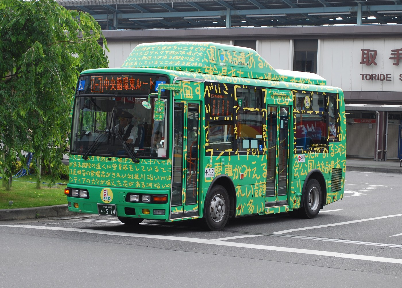 大利根交通自動車土浦200あ514。取手駅東口前の歩道上にて撮影。取手市コミュニティバス「ことバス」。